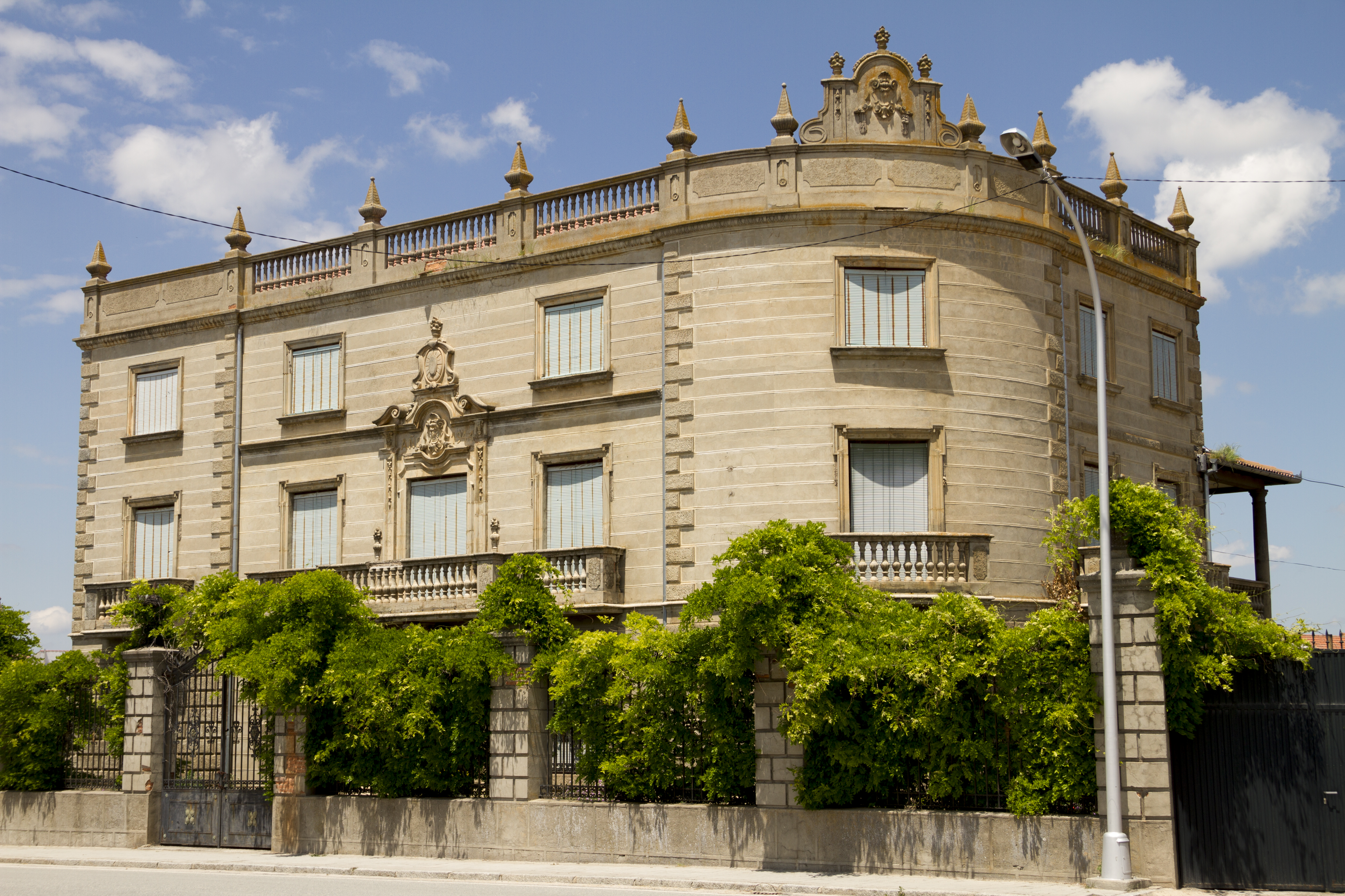 Navas de Oro